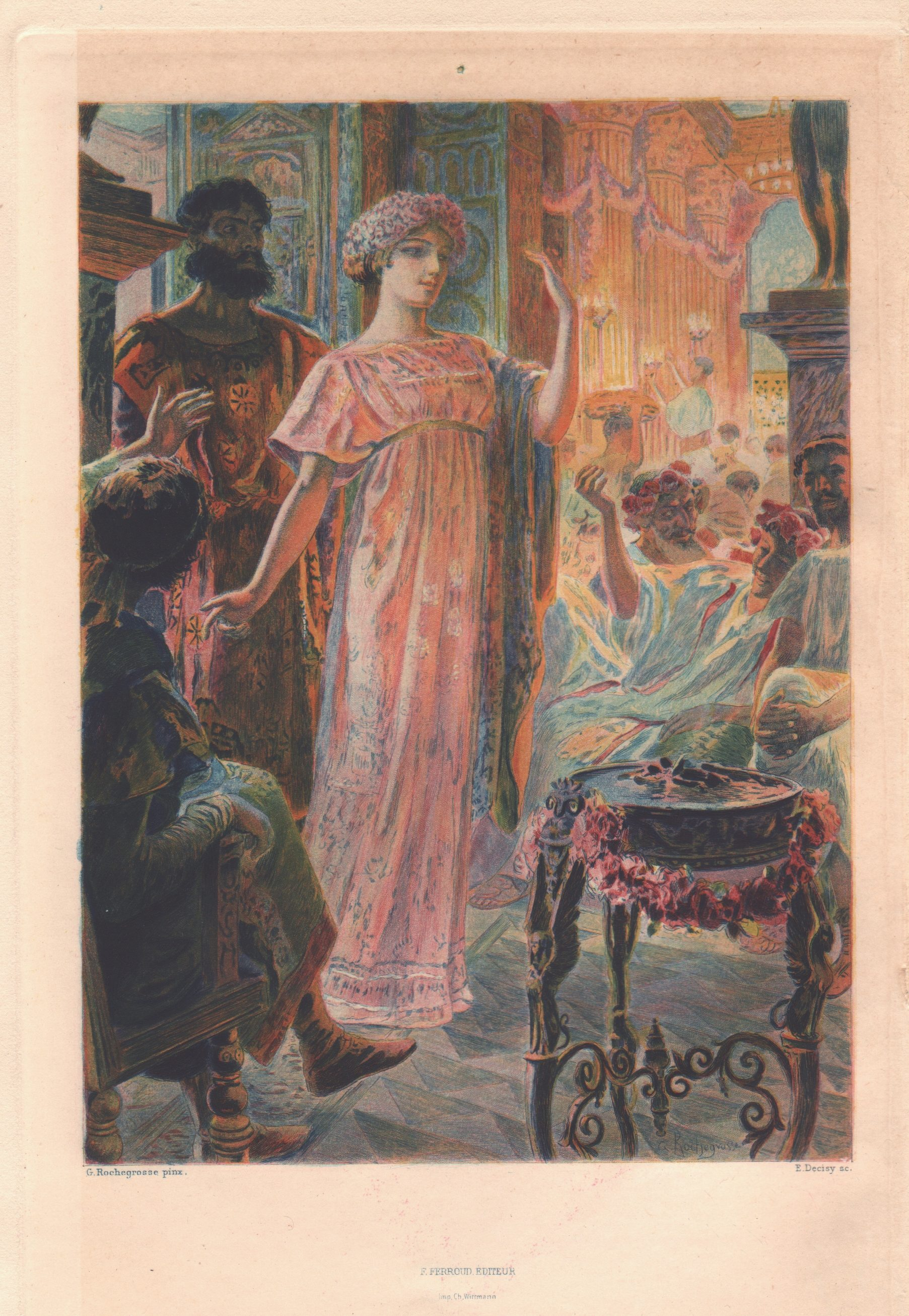 Frontispice de Thaïs d'Anatole France ; Paris; Librairie des amateurs, A. Ferroud - F. Ferroud, successeur, 1909